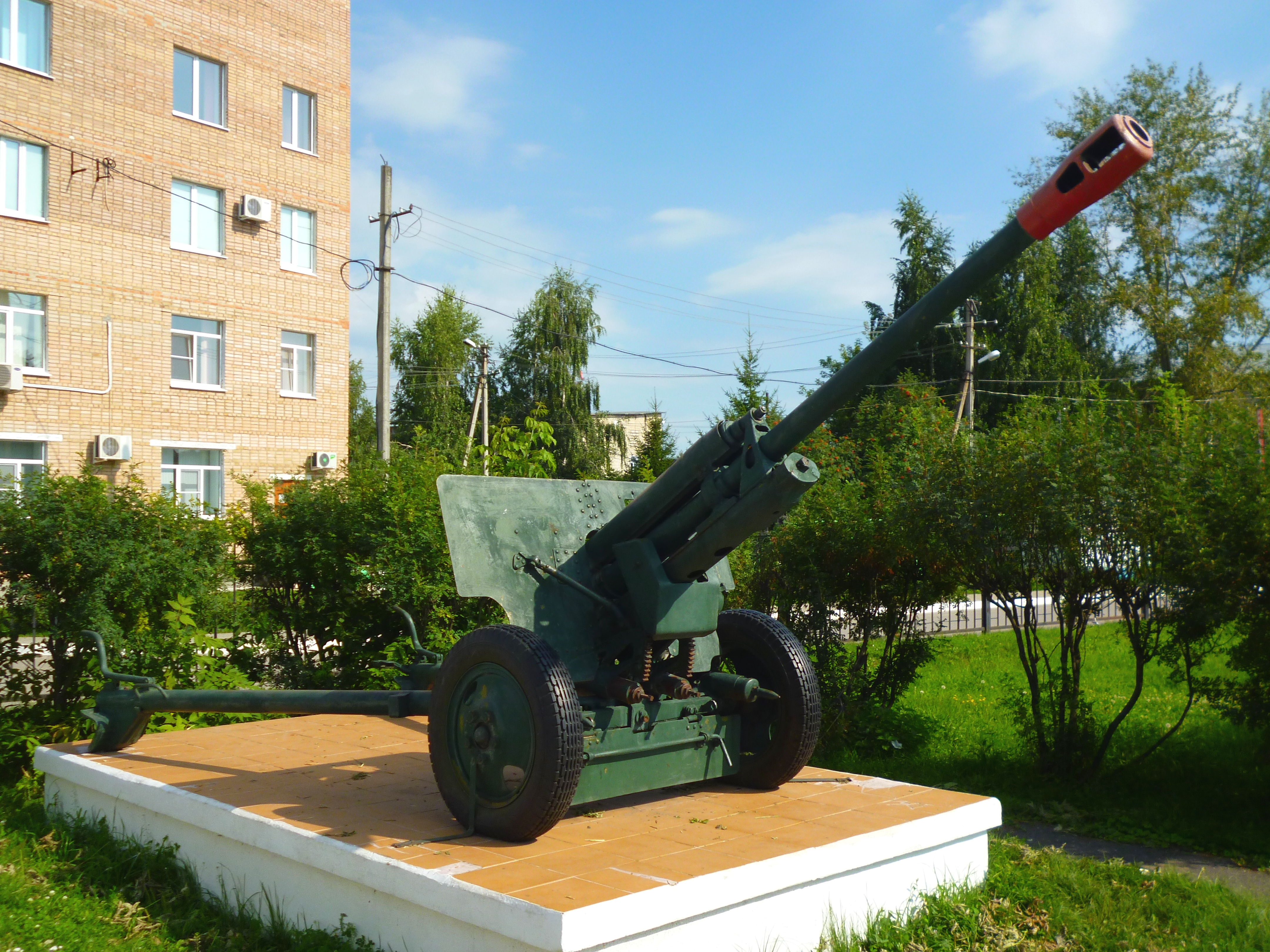 Арлиллерийское орудие